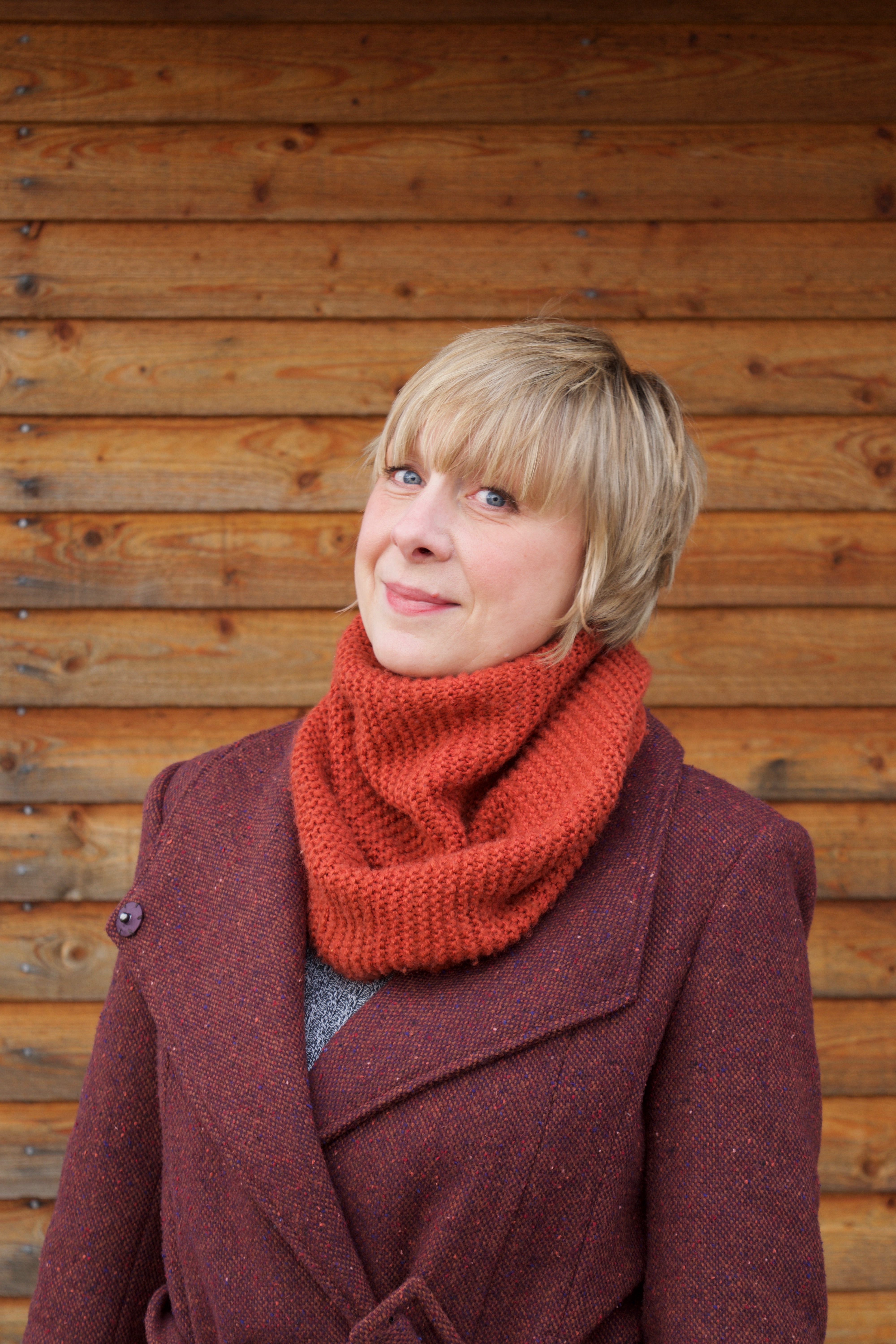 Foto av Bruno Wegelius